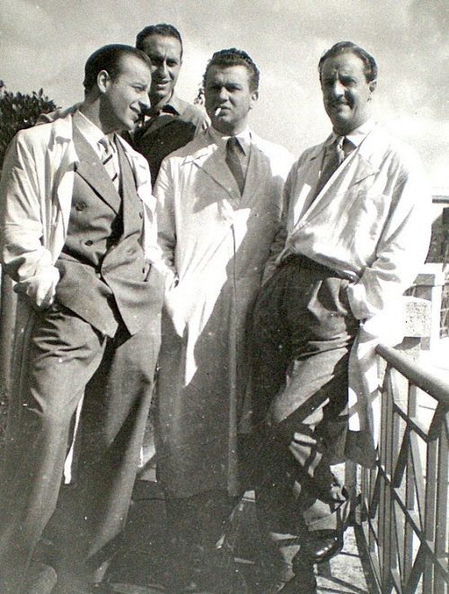 L'operatore Romolo Garroni con il cast de L'ultimo addio